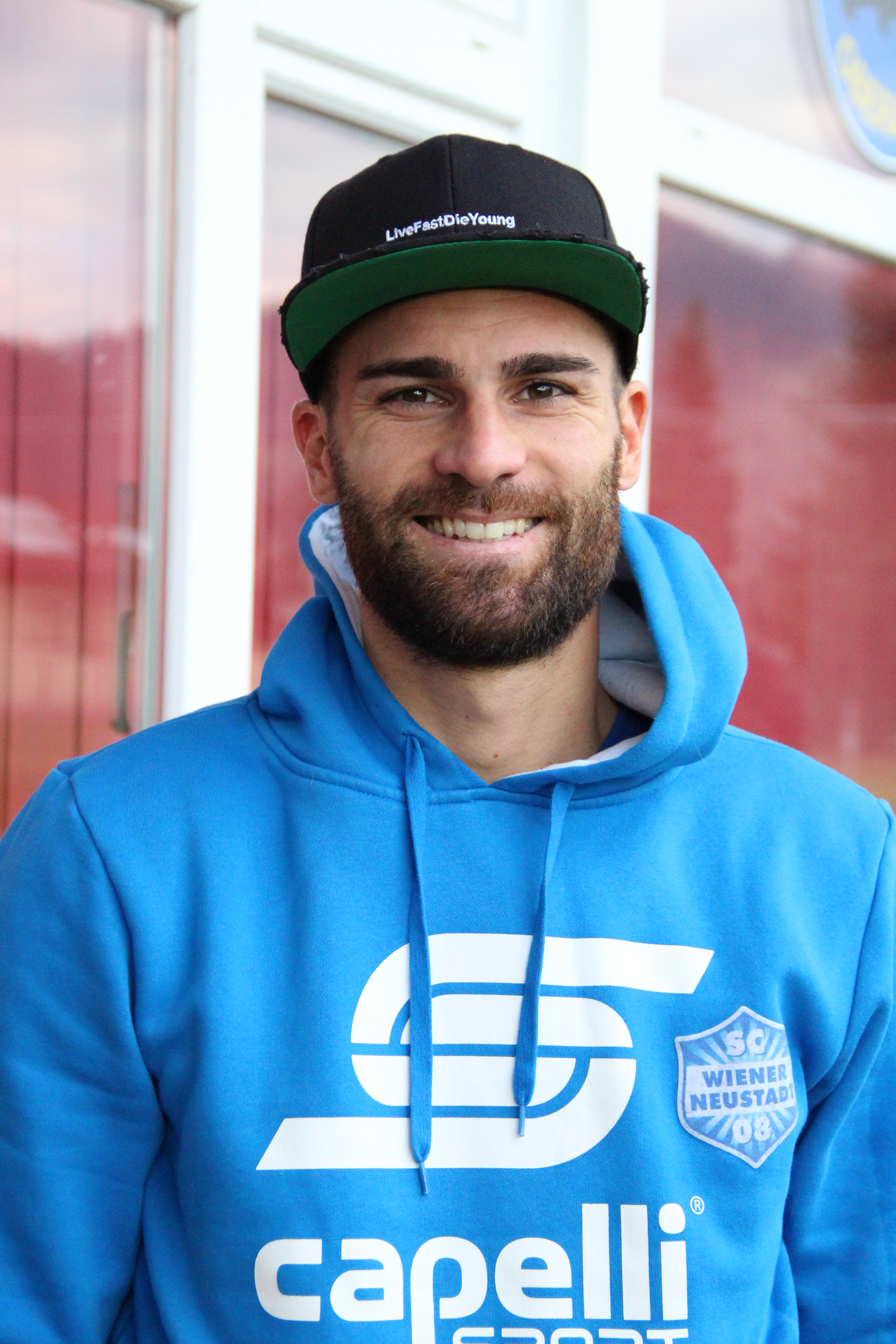 Manuel Seidl (SCWN)